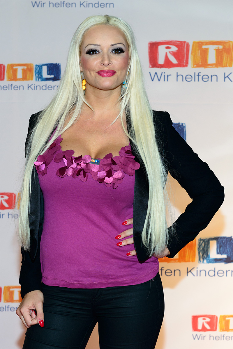 Daniela Katzenberger auf dem RTL-Spendenmarathon 2014 in Hürth bei Köln.